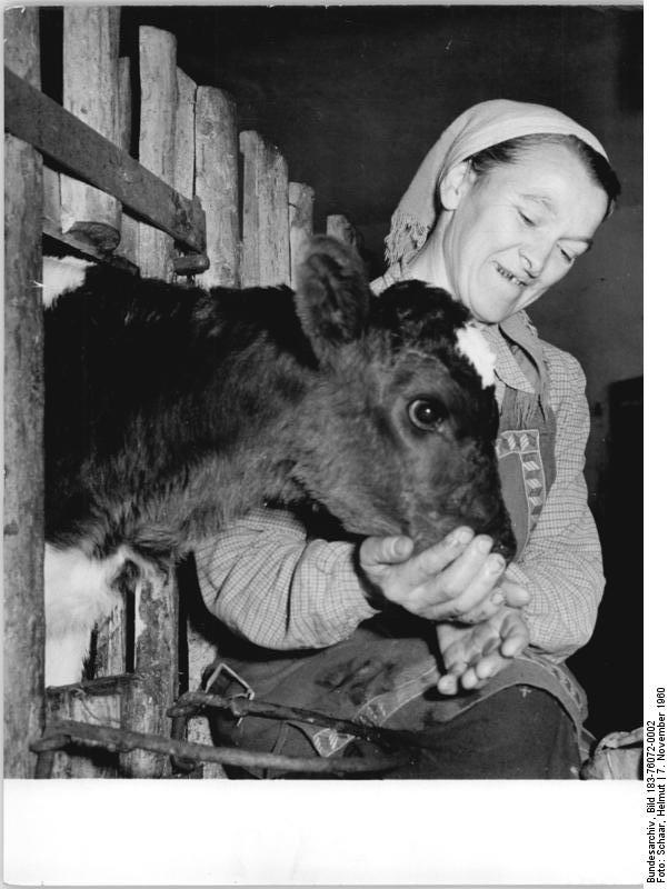 Mutzschen, Bäuerin mit Kalb Zentralbild Schaar 7.11.1960 Mit großen Erfolgen zum 6. Deutschen Bauernkongress Zu Ehren des 6.Deutschen Bauernkongresses verpflichten sich die Mitglieder der LPG "Rotes Banner" in Mutzschen (Kreis Grimma) den Staatsplan in allen Positionen bis zum 8.12.1960 100 prozentig zu erfüllen.Bis Ende des Jahres sollen 30 dt Schwein, 30 dt Rind , 4 dt Geflügel sowie 30.000 kg Milch unserer Bevölkerung zur Verfügung zu stellen. UBz: Die LPG -Bäuerin Frida Pelz betreut dias Kälberkombinat der LPG.